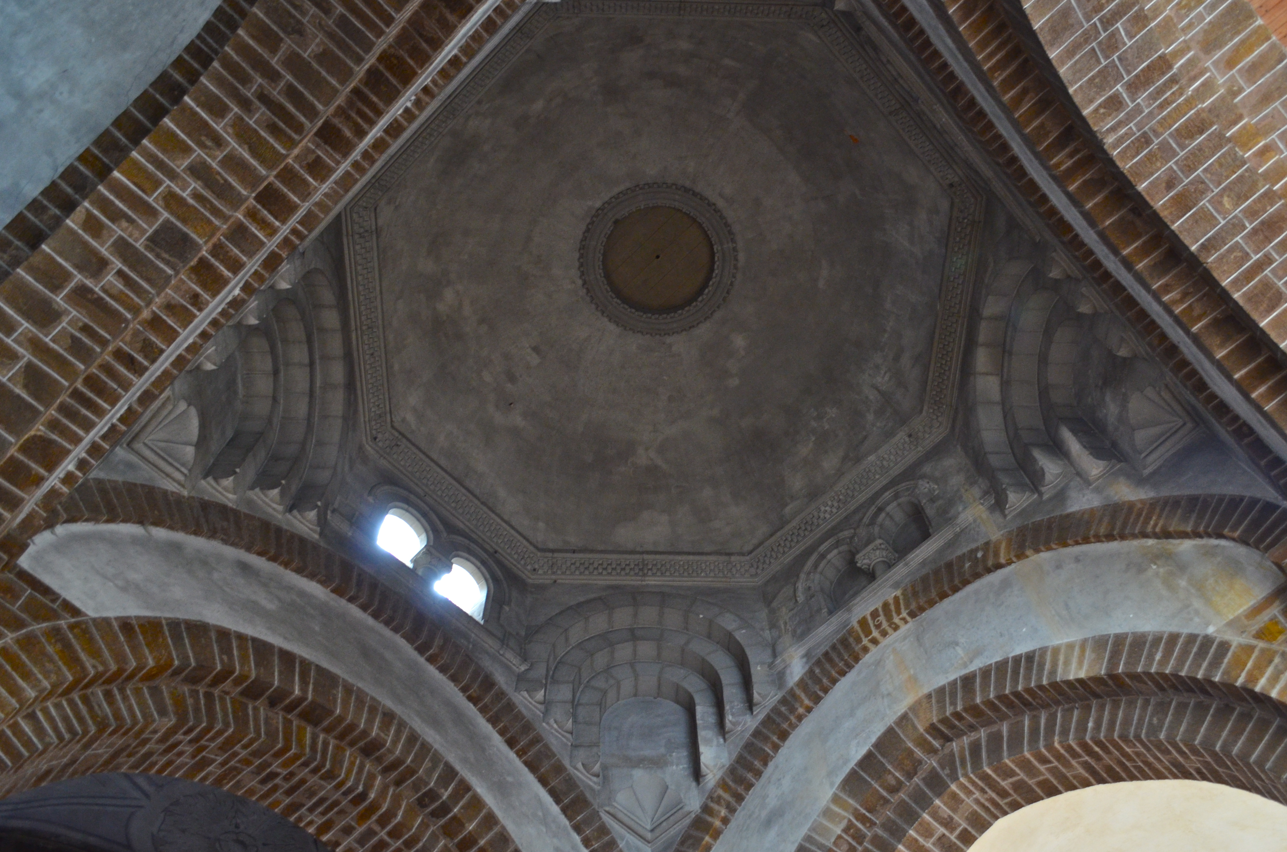 Eglise Saint-Jean de Béré - Châteaubriant (Loire-Atlantique)